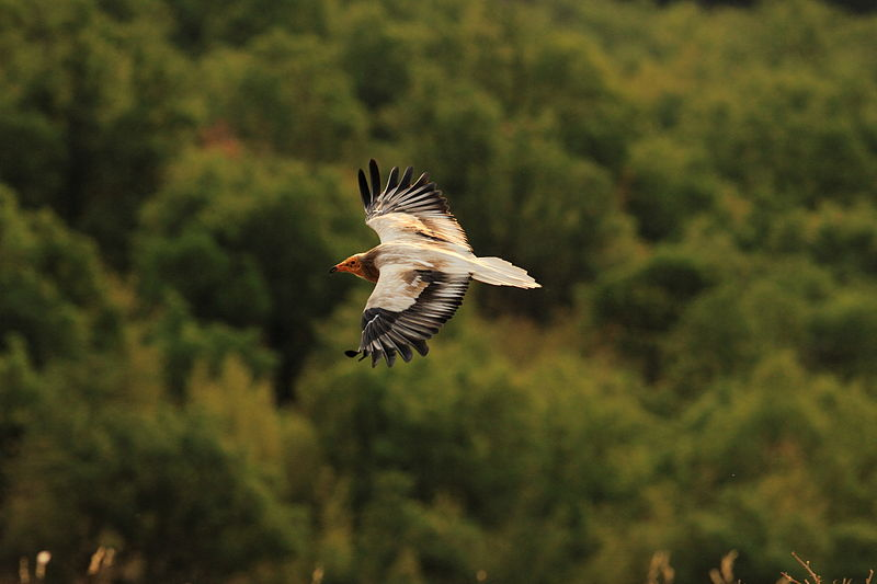 Египетски лешояд в полет